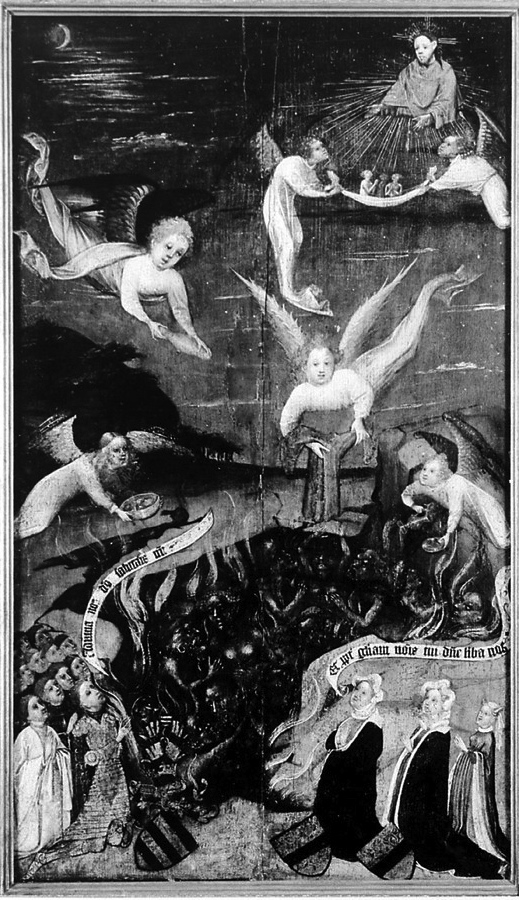 retable Pallant - libération du purgatoire